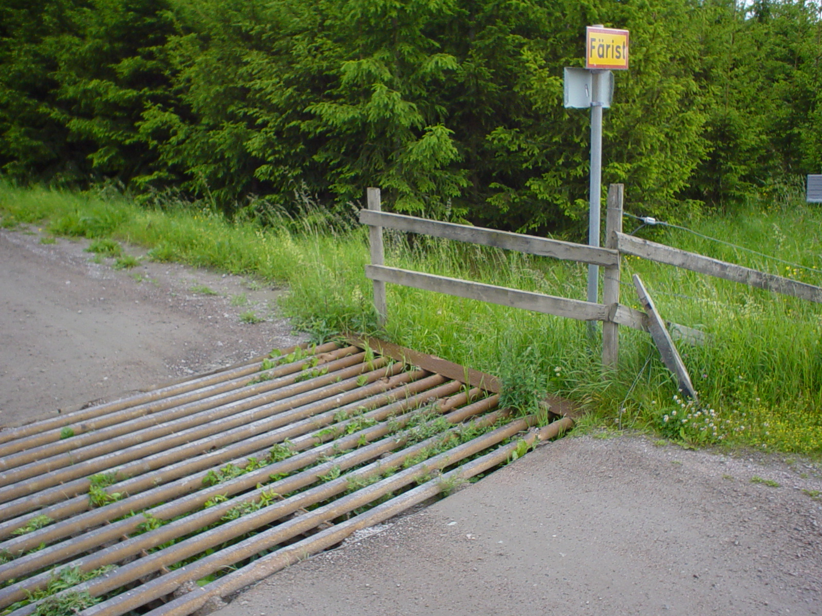 Färist, Tinnerö, Linköping